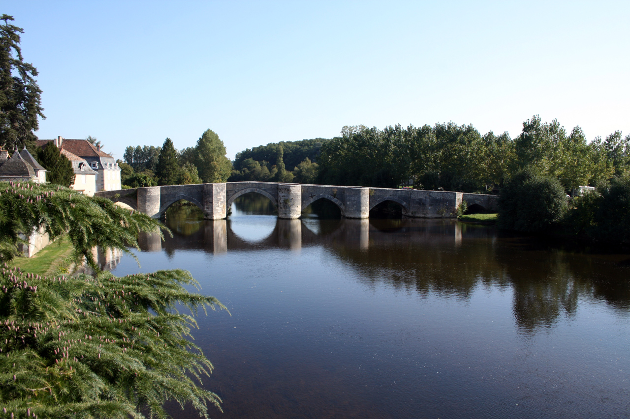 Pont sur la Gartempe entre Saint-Germain et Saint-Savin